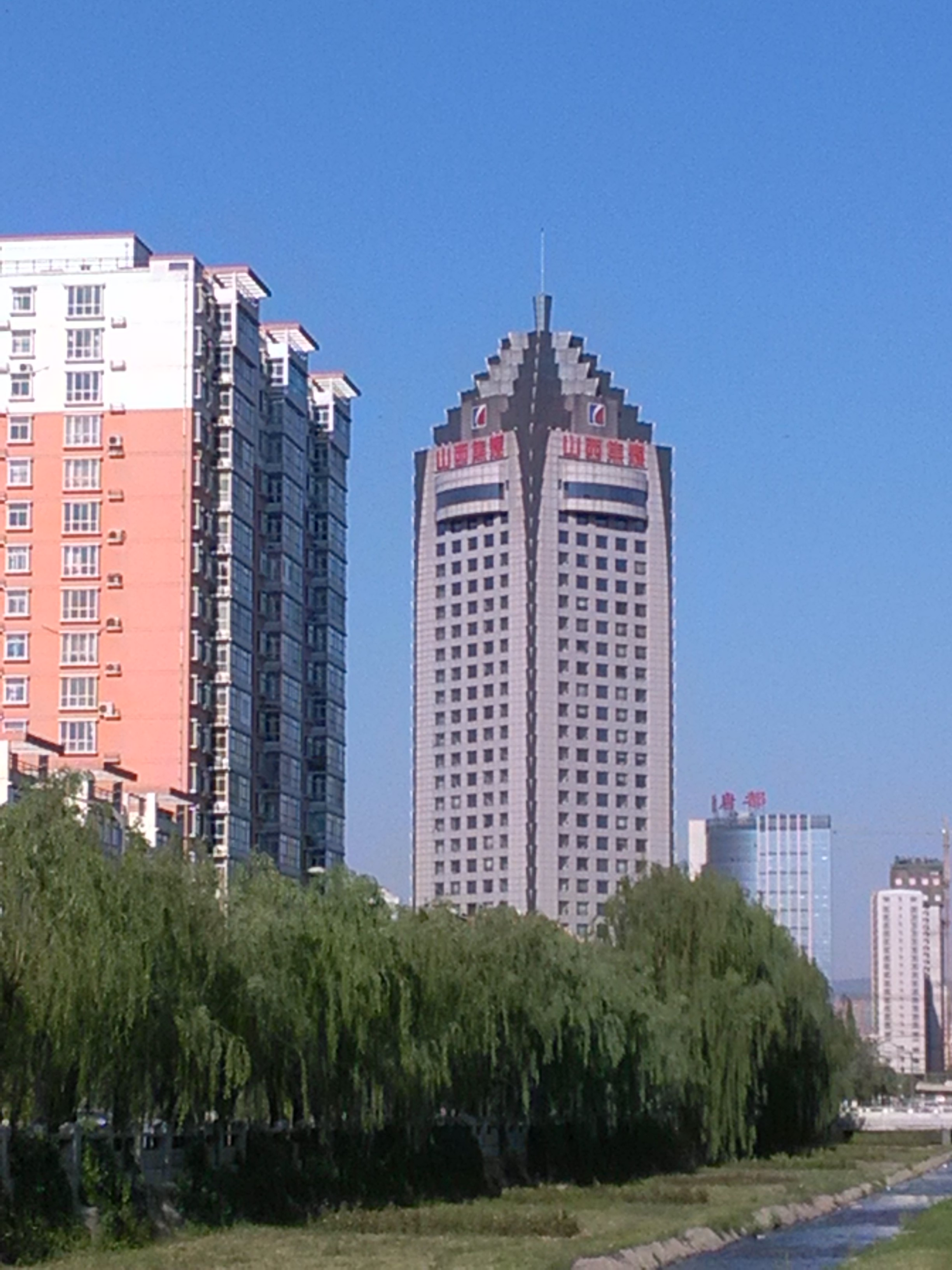 山西焦煤办公大楼。